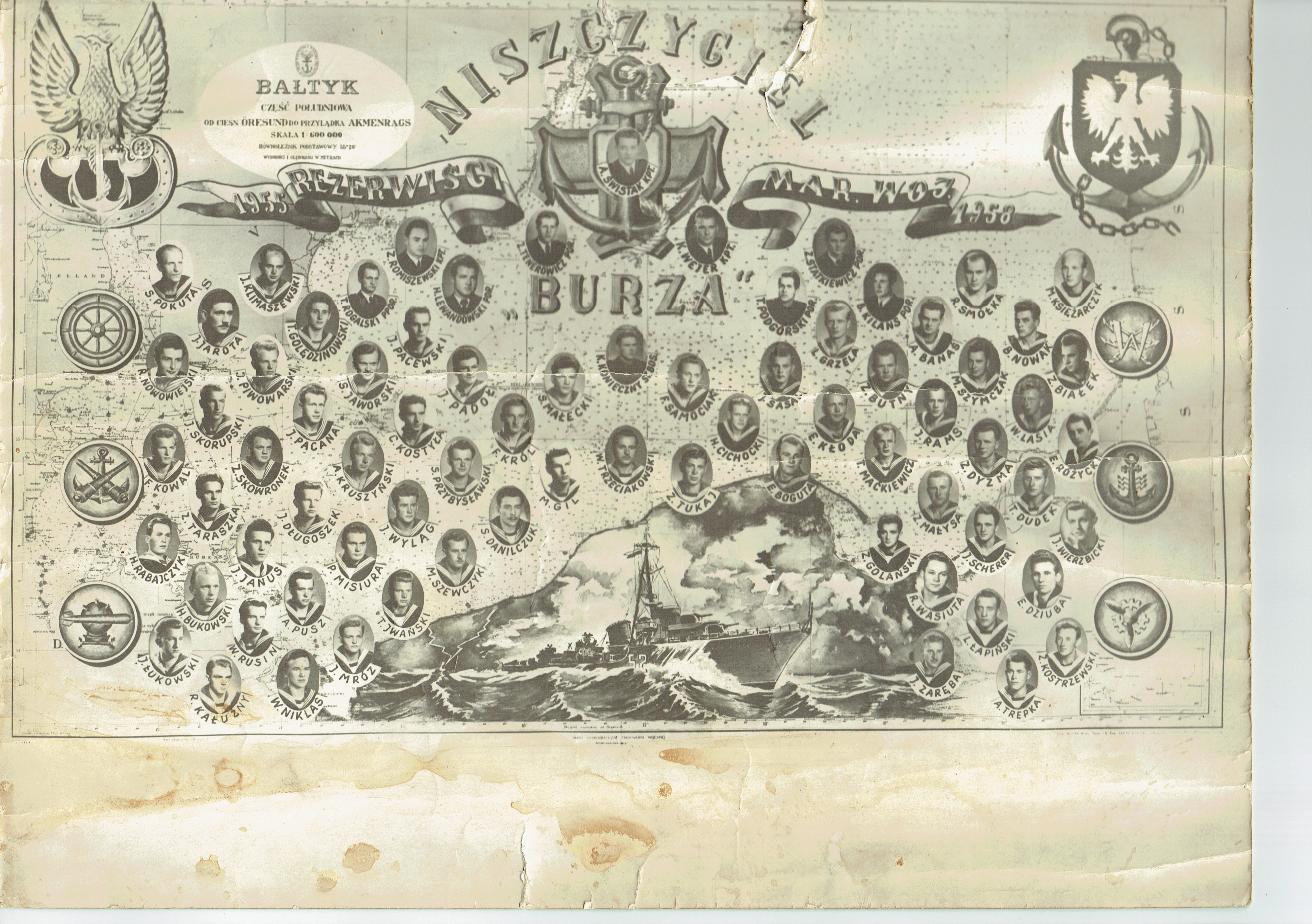 Kpt Adam Świstak